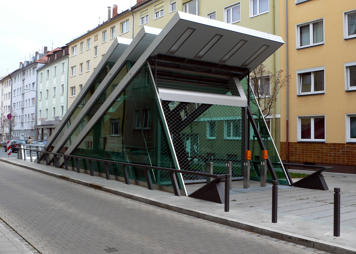 U-Bahnhof Maxfeld der U-Bahn Nürnberg, Oberfläche, Westzugang, Blick von Nordwesten